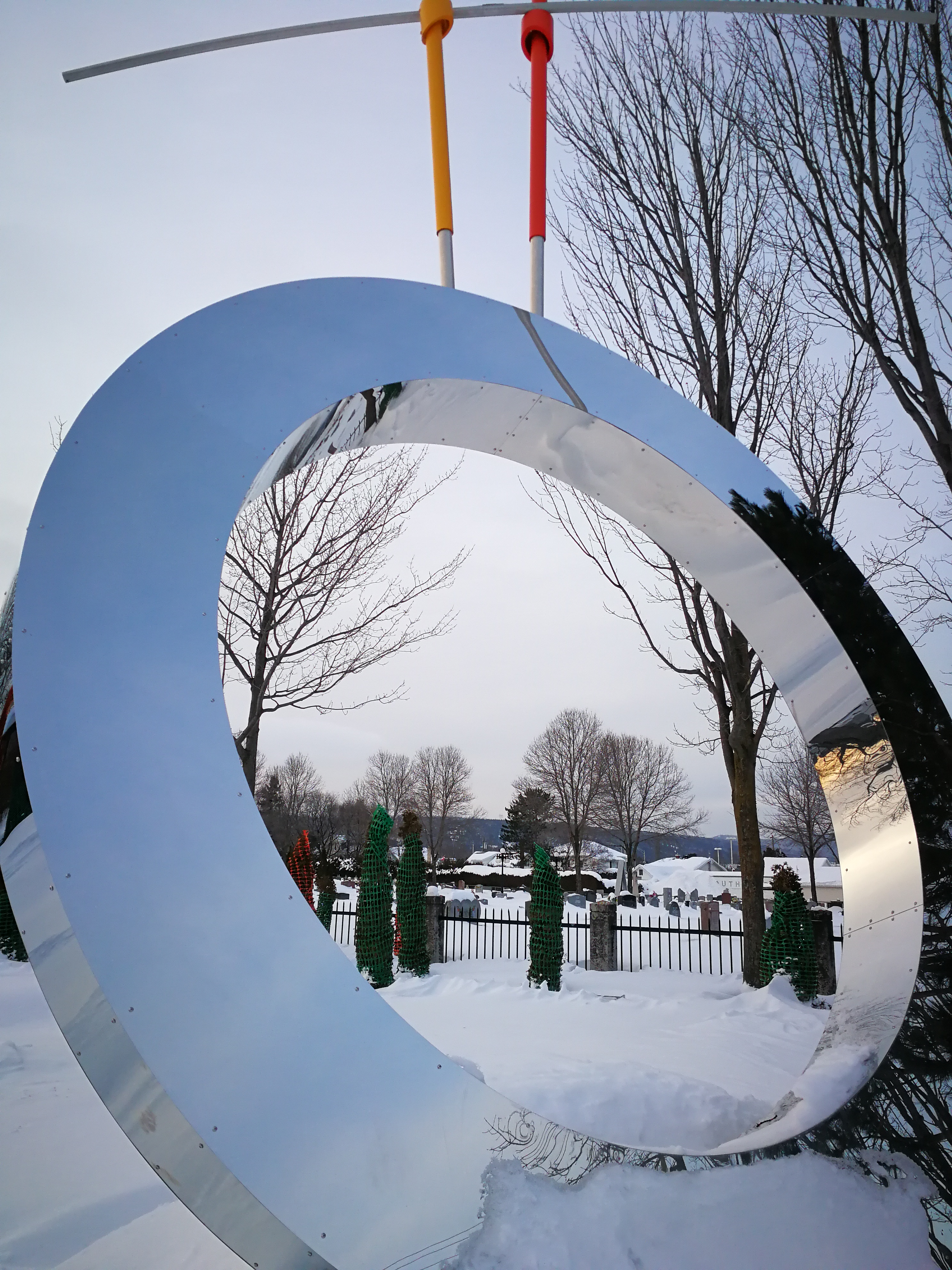 Place du citoyen, Baie-Saint-Paul, Québec "En 2009, à l’occasion du 25e anniversaire du Cirque du Soleil, Baie-Saint-Paul a commémoré ce géant aujourd’hui reconnu mondialement. La Ville a aménagé la place du citoyen, y accueillant l’œuvre de Danielle April, artiste multidisciplinaire originaire de Québec. Allusion à l’équilibre spectaculaire des artistes de la piste et clin d’œil au temps des Échassiers de la Baie, deux échasses sont posées en équilibre sur un anneau de métal placé selon un angle précaire qui symbolise la terre sur laquelle nous vivons. Une citation de David Suzuki dans la pierre souligne « Le pouvoir que détient chacun d’entre nous sur l’avenir de la terre ». "